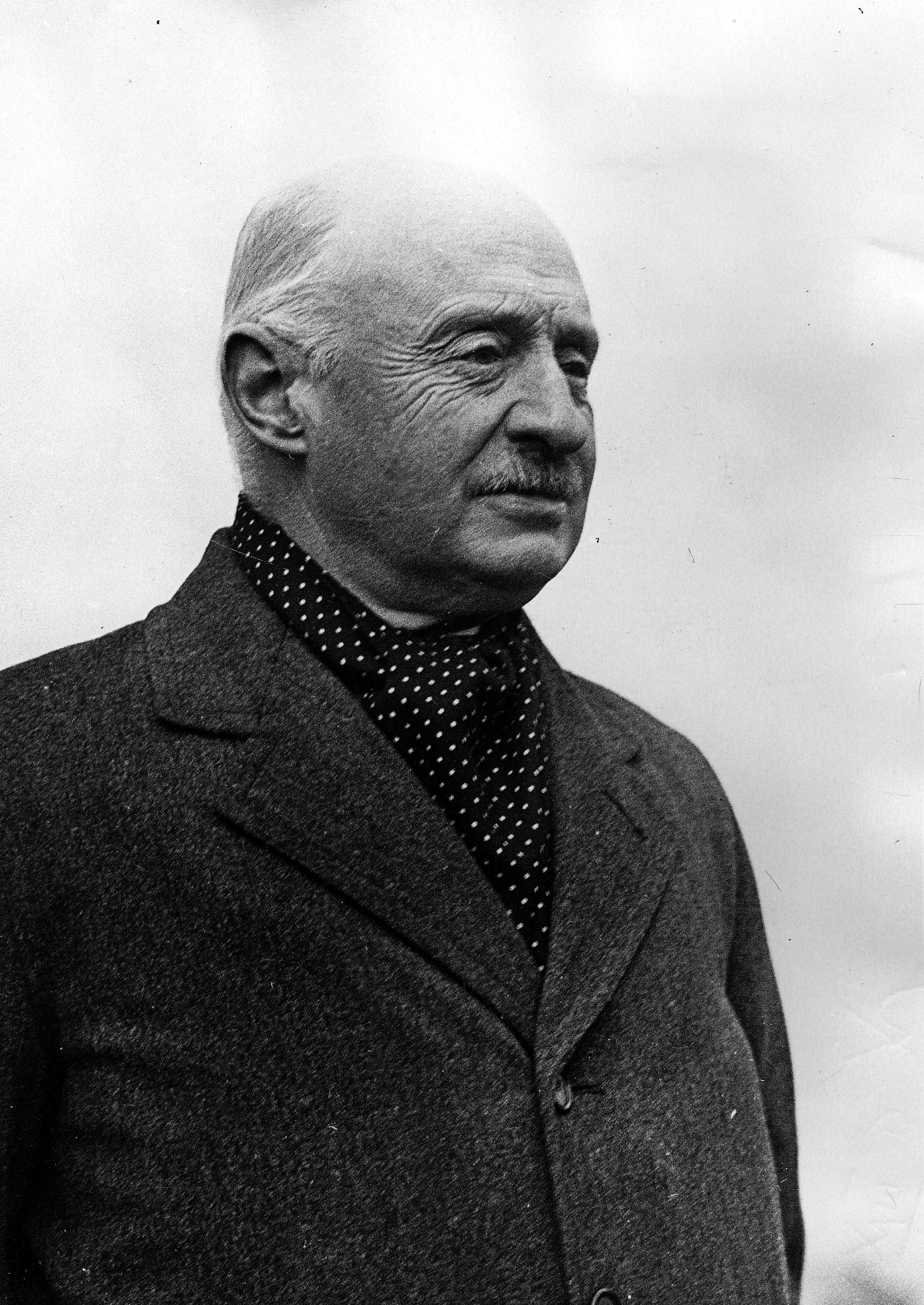 Henri de Baillet-Latour. Fotografia portretowa.